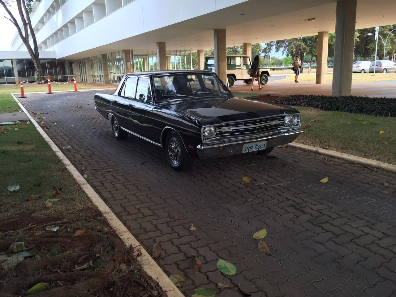 Dodge Dart Sedan 1 972